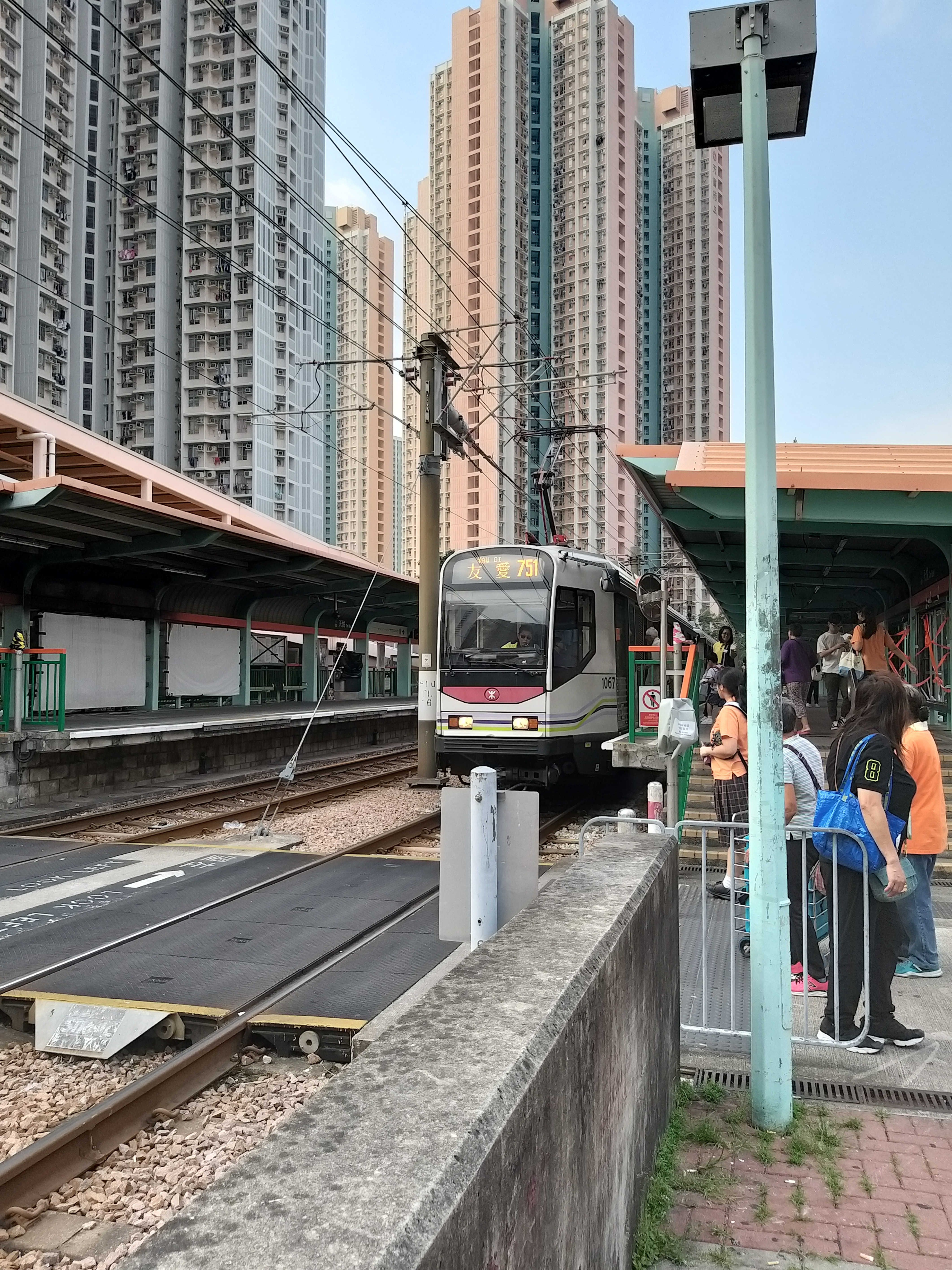 中文（香港）: 因為改道751加停天恆至天悅站